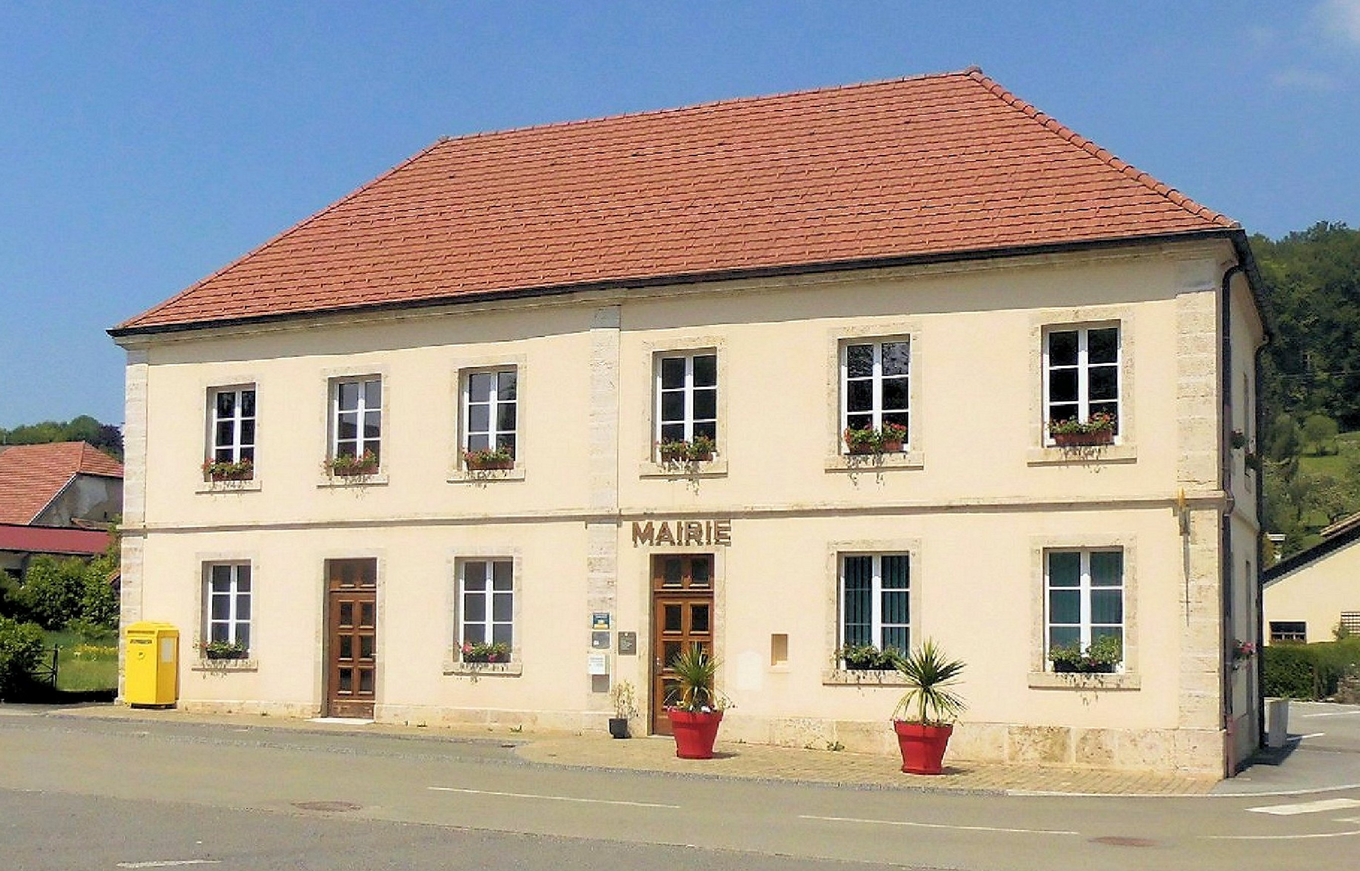 La mairie de Chamesol